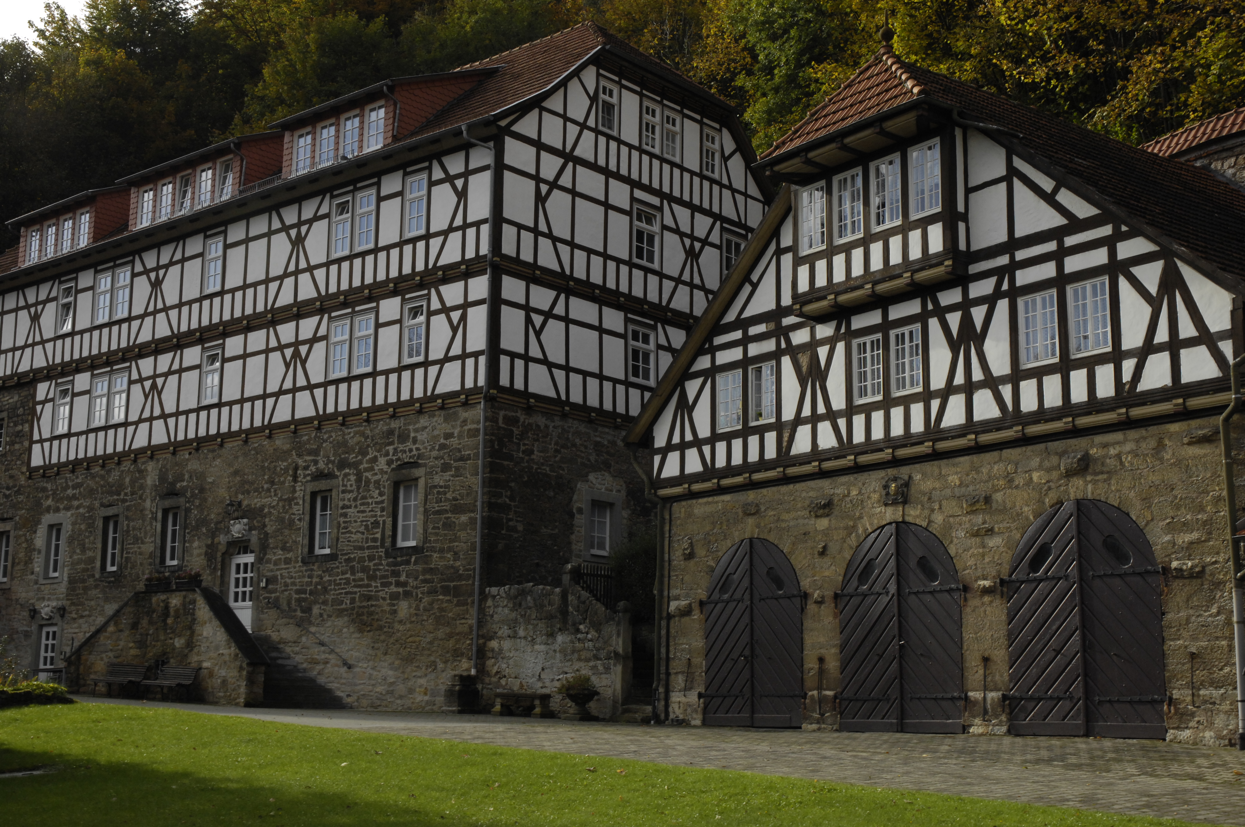 Kloster Zella im südlichen Eichsfeld, sehr schön restaurierte Fachwerkgebäude